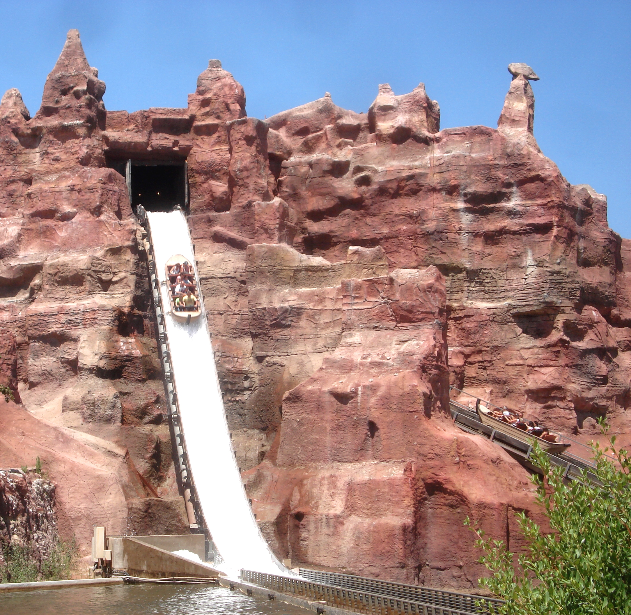 Vista de la Atracción rio bravo